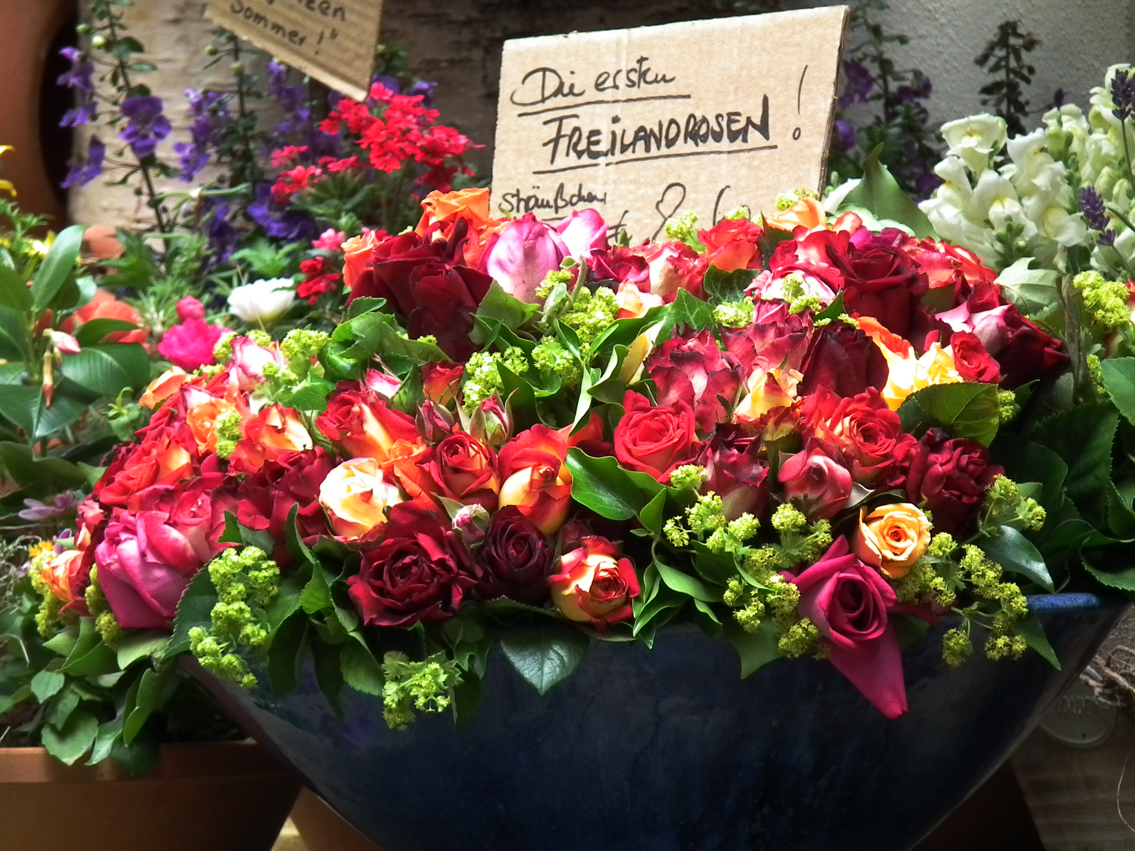 Kleine Blumensträuße aus Freilandrosen, fotografiert in Heidelberg (Baden-Württemberg, Deutschland)